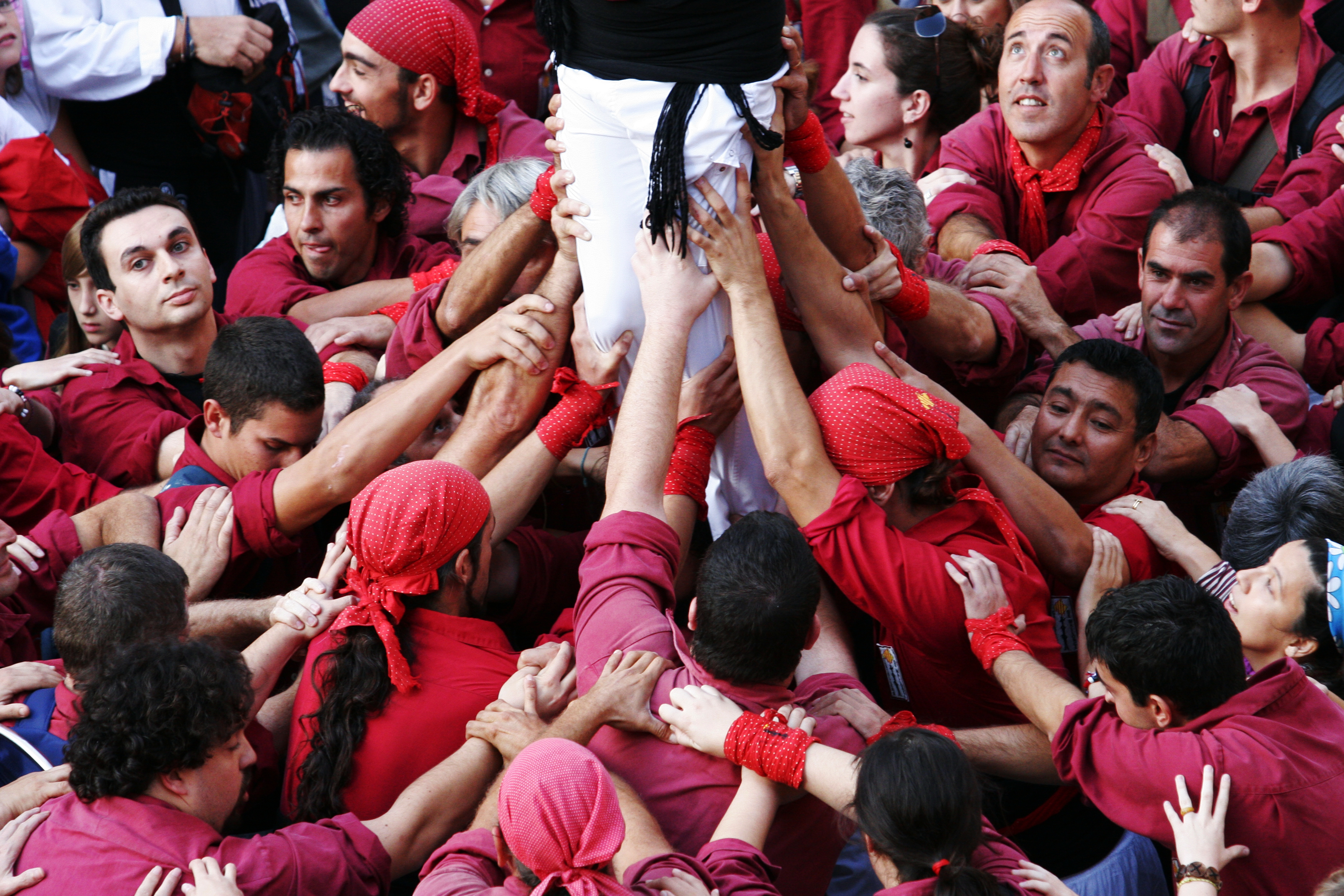 Pinya dels Castellers de Mallorca